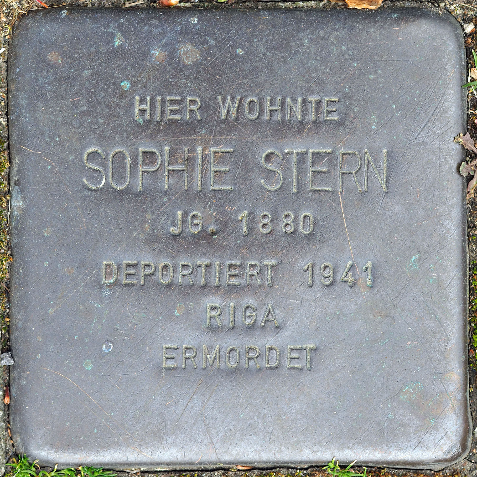 Stolpersteine MG: Stern, Sophie